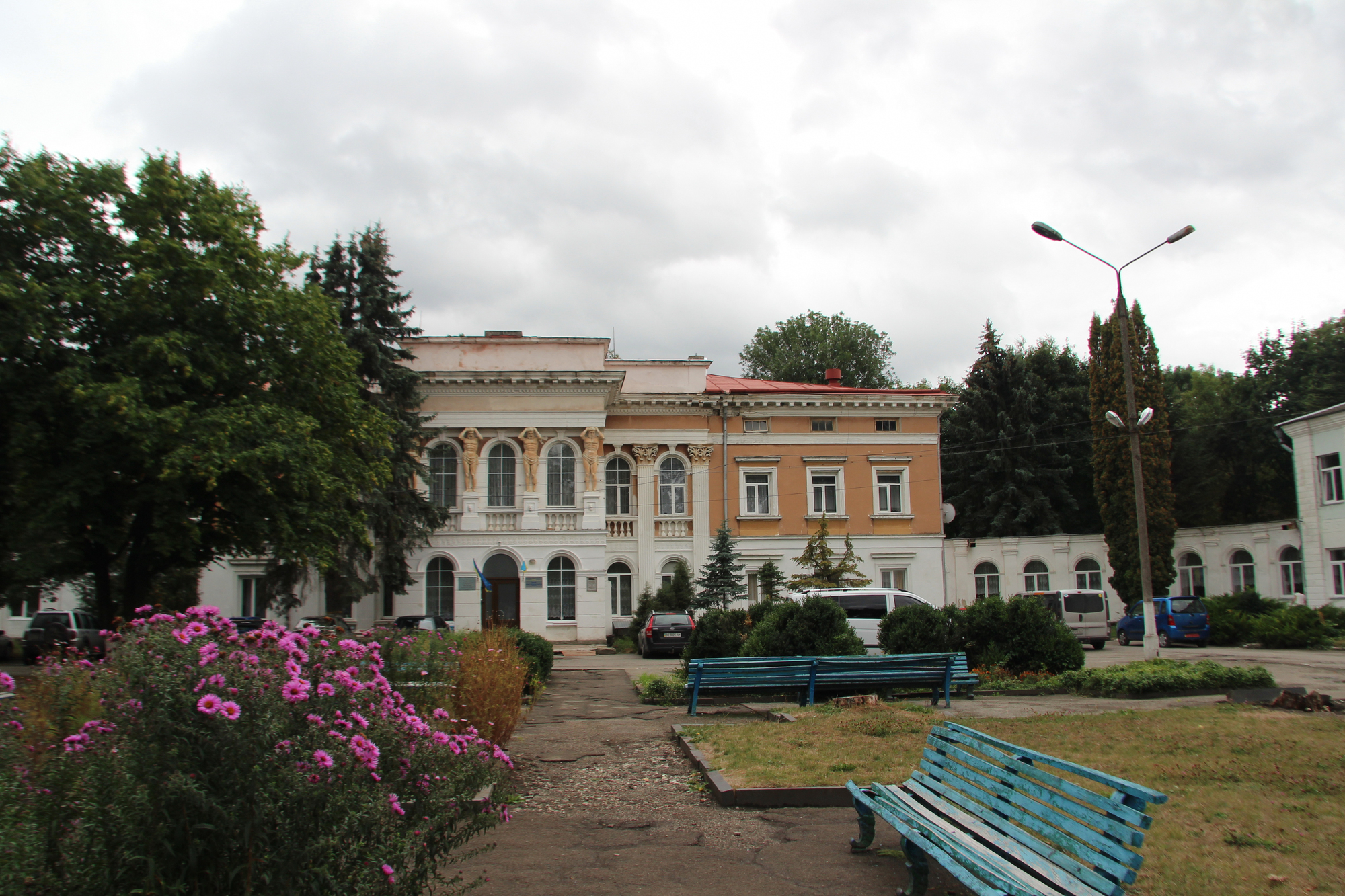 Палац, смт Микулинці, вул. Хоткевича, 2